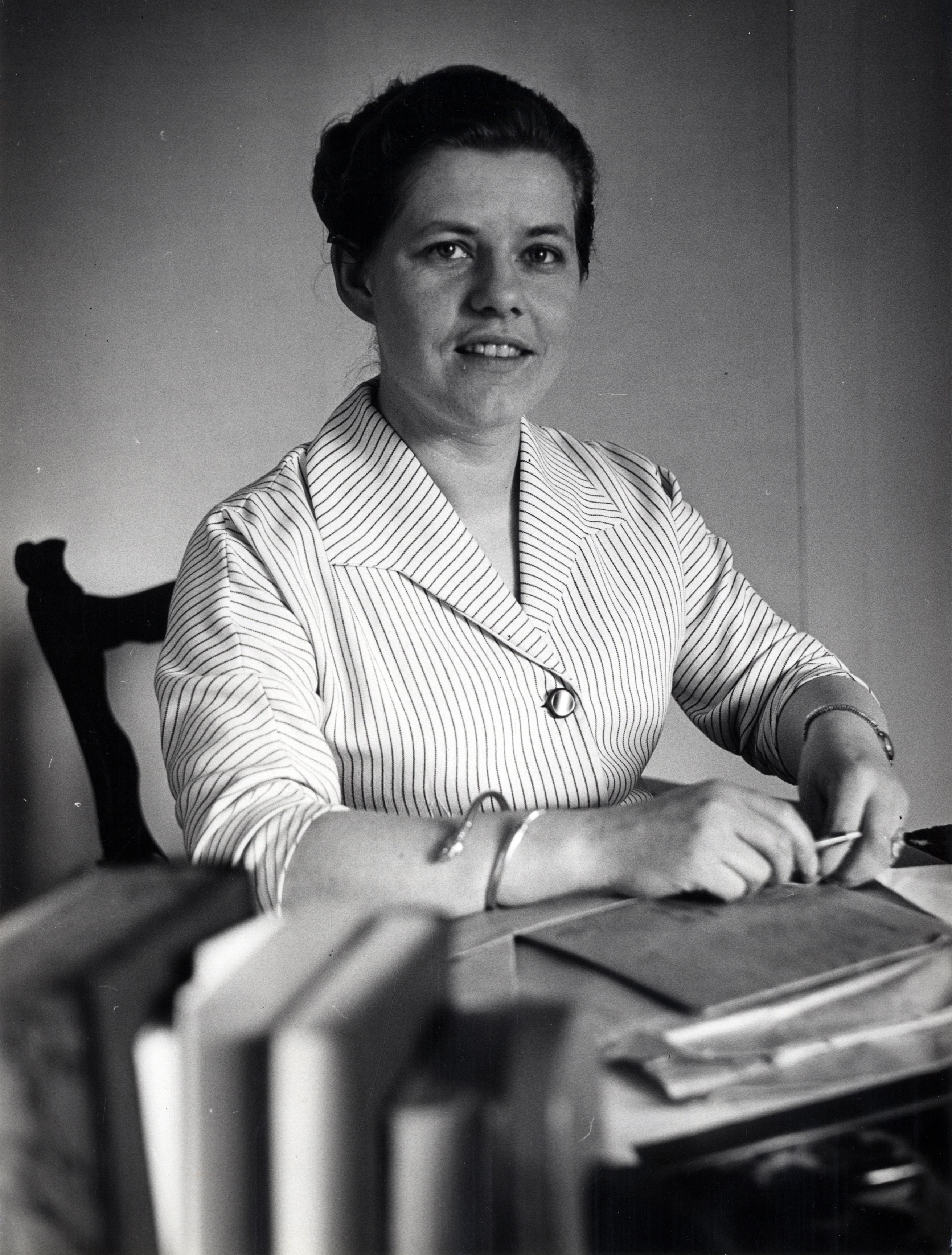 Portret van mevrouw J.M.Th. Knol, politica namens de KVP / PPR. Nederland, datum onbekend.